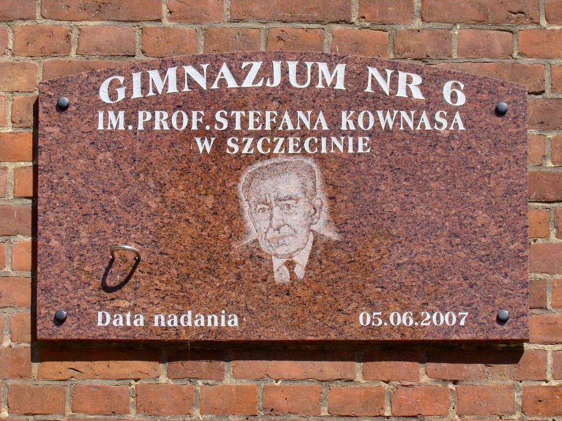 Tablica na gmachu Gimnazjum Nr 6 w Szczecinie poświęcona patronowi szkoły: prof. Stefanowi Kownasowi (1898-1978) – wybitnemu polskiemu botanikowi, jednemu z organizatorów Wyższej Szkoły Rolniczej w Szczecinie (późniejszej Akademii Rolniczej) - obecnie ZUT.